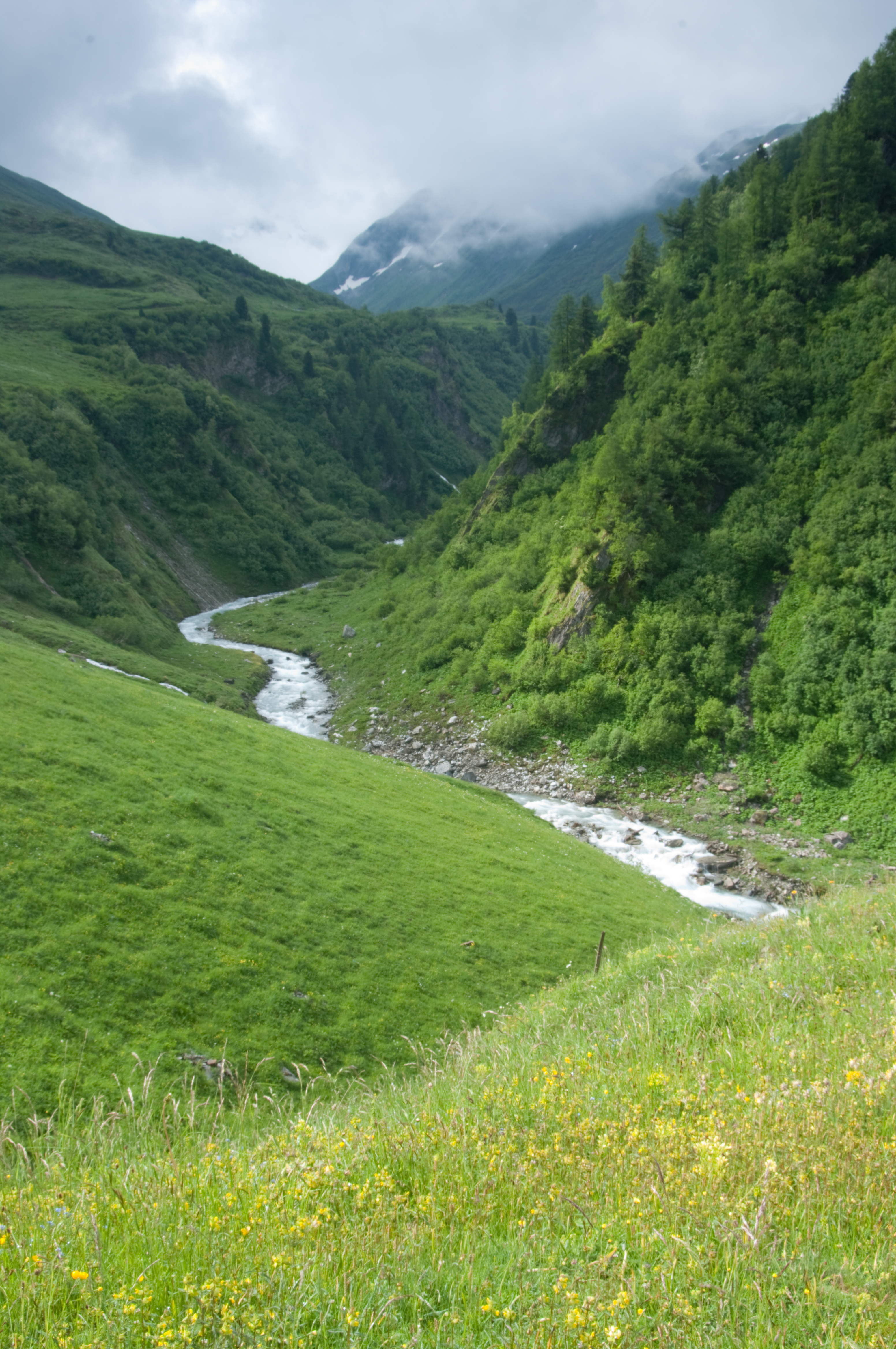 THe river Dranse de Ferret in Valais, Switzerland